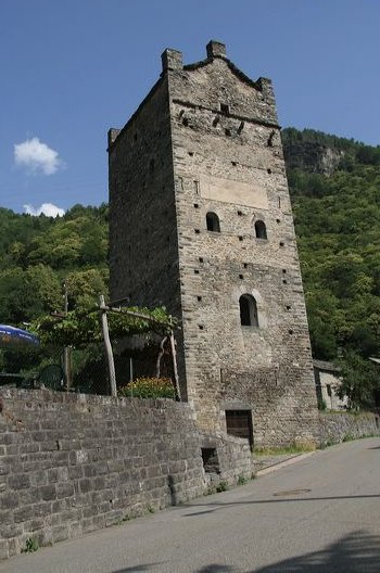 La Fiorenzana, mittelalterlicher Turm in Grono GR